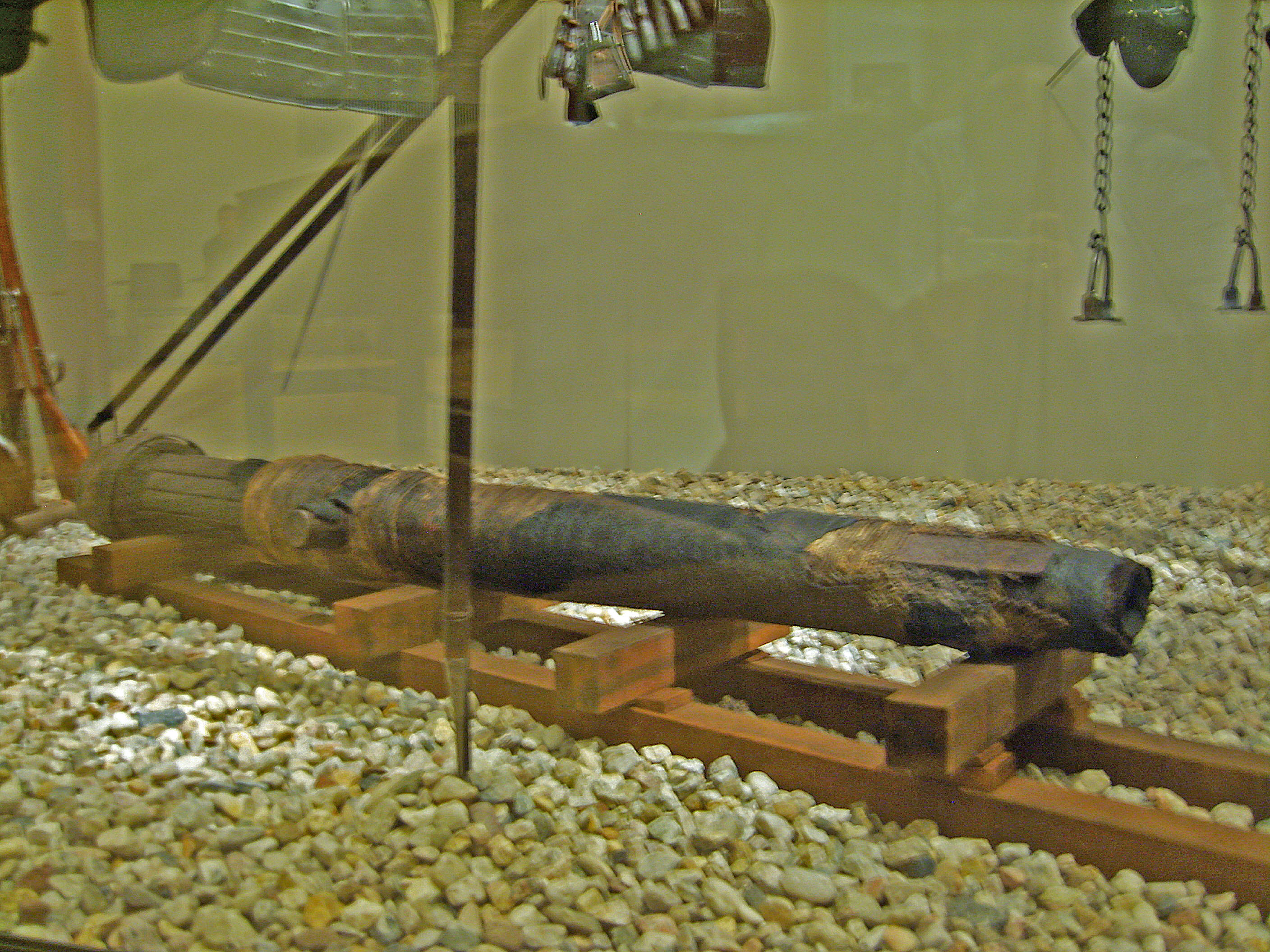 Einpfündige Lederkanone Kupfer, Eisen, Hanf und Leder 1620/1650 Ein mit Eisenblech versteiftes, kupfernes Rohr, ist mit Hanf umwickelt und mit festem Leder zusammengehalten. aus der ständigen Sammlung des Deutschen Historischen Museum, Berlin